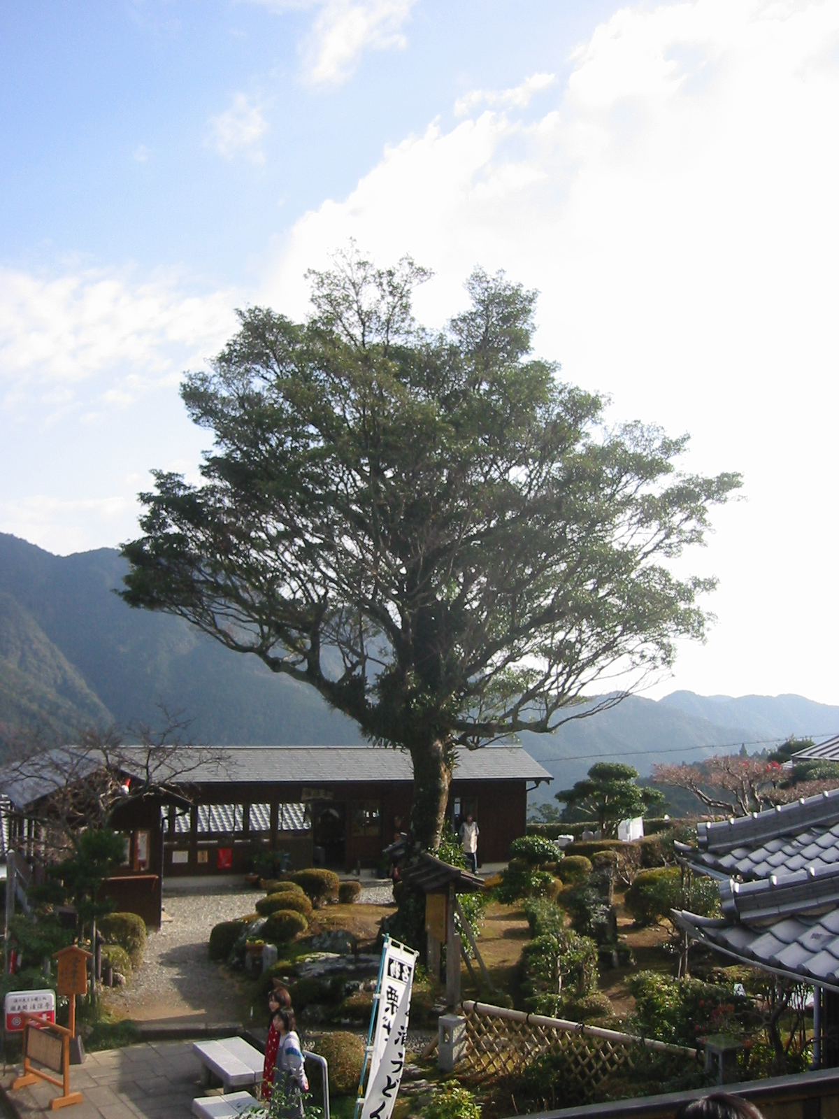 熊野那智大社 行幸啓宿泊所 王子実方院跡